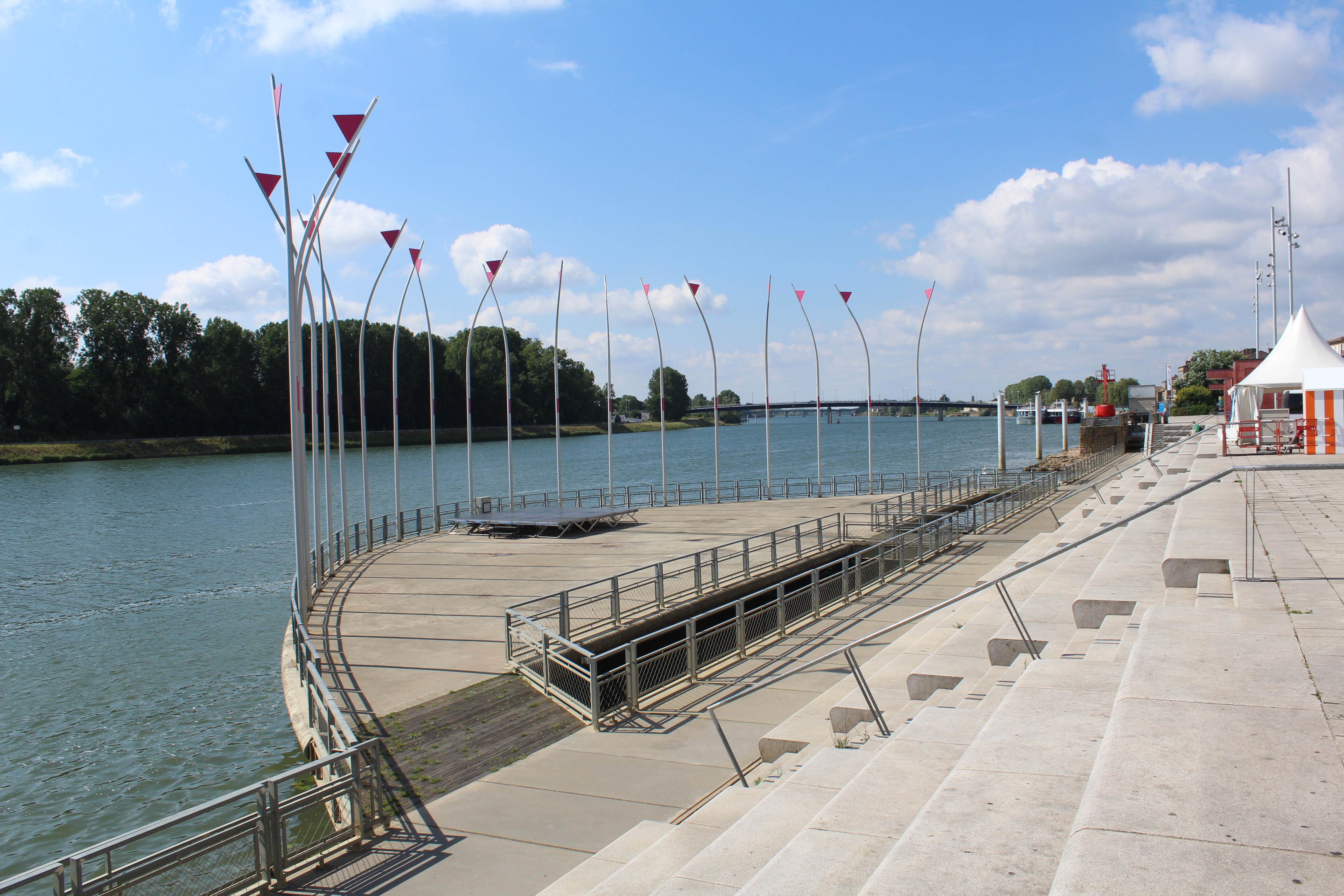 Scène sur l'eau à l'esplanade Lamartine de Mâcon.